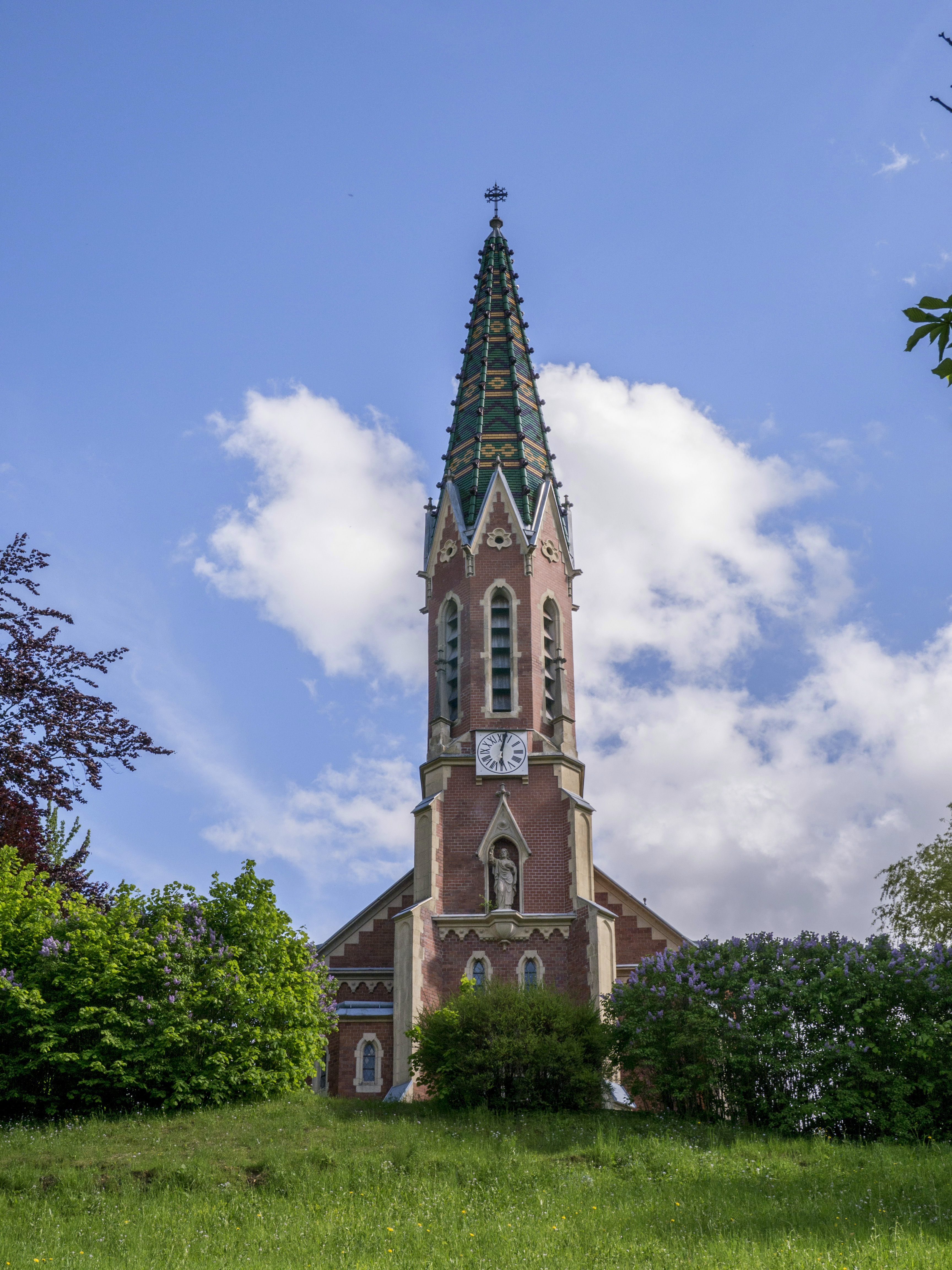 Evang. Pfarrkirche A.B., Heilandskirche